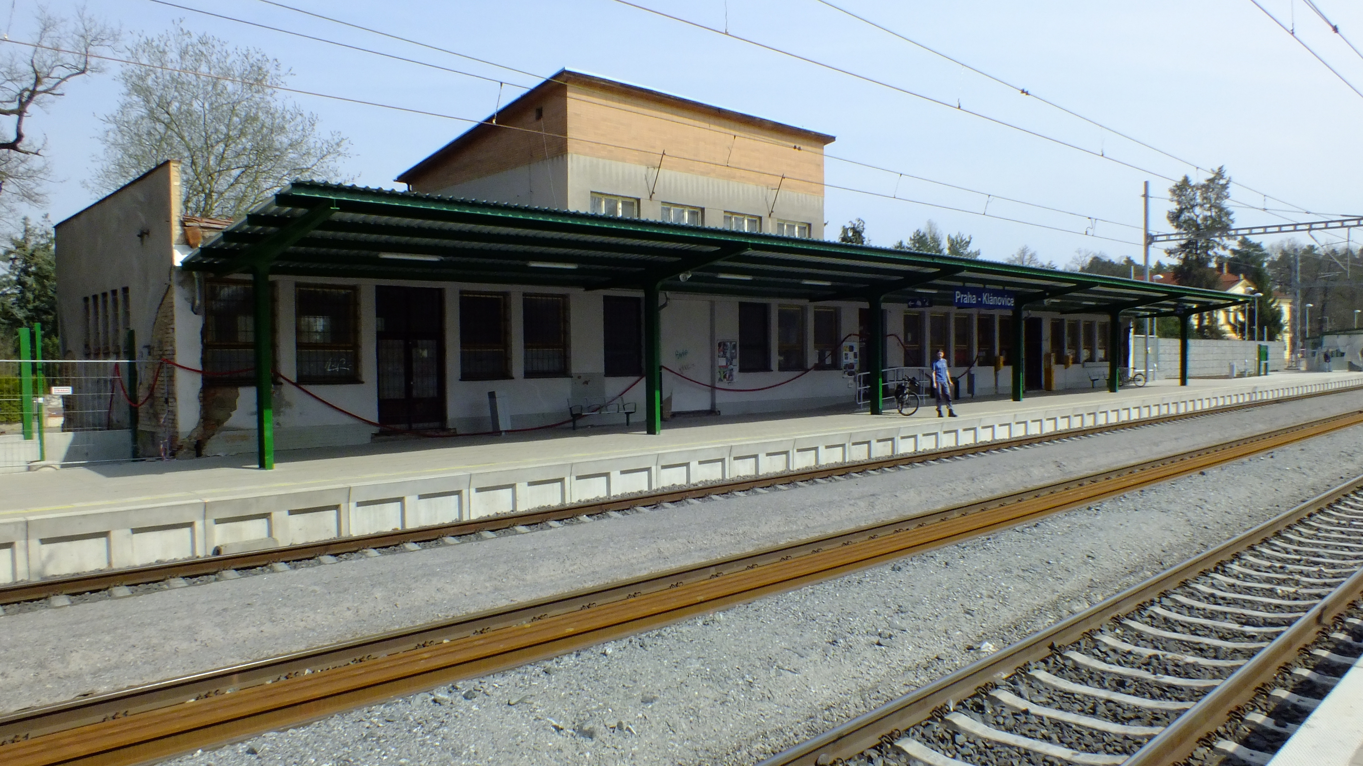 Staniční budova